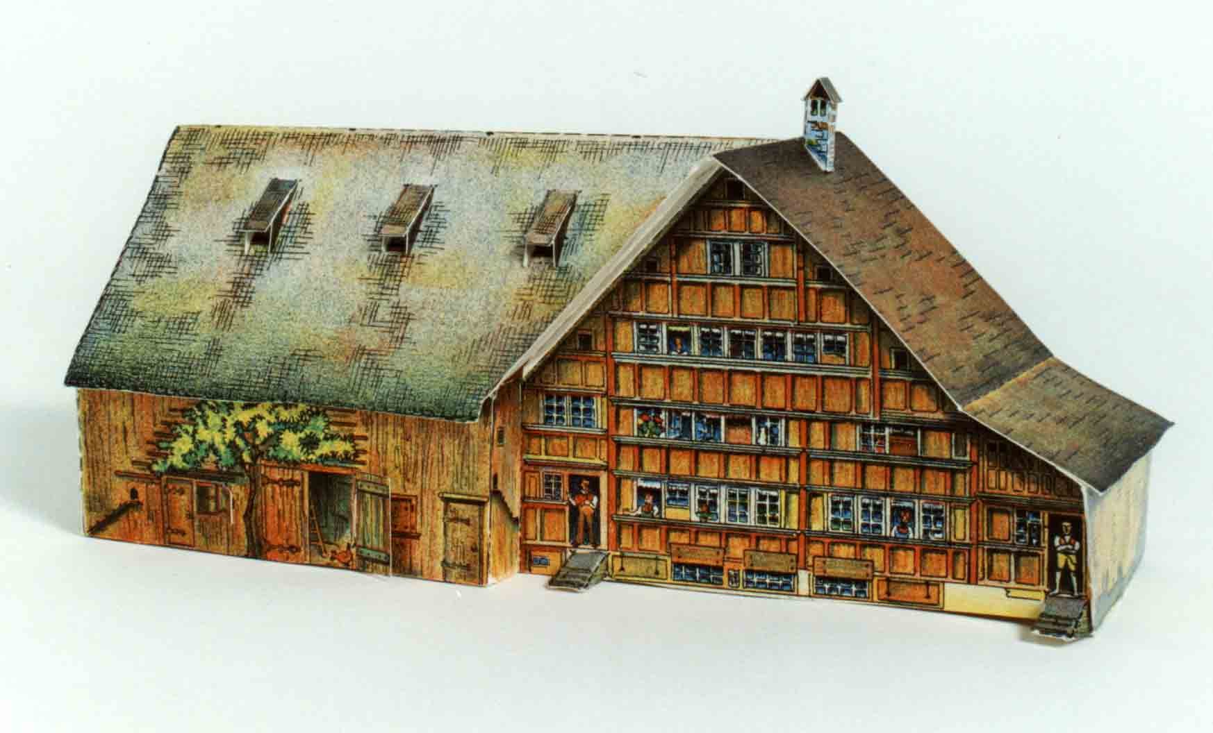 Kartonmodell eines Bauernhauses aus dem Kanton Appenzell, ein Modell des Verlages Pädagogischer Verlag des Lehrerinnen- und Lehrervereins Zürich von Heinrich Pfenninger